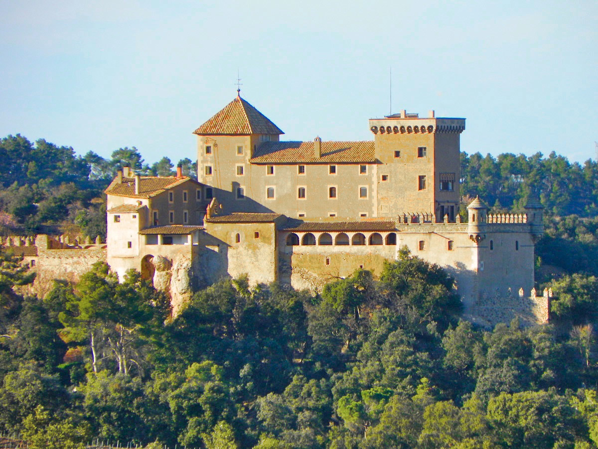 Castell de Riudabella, prop de Poblet